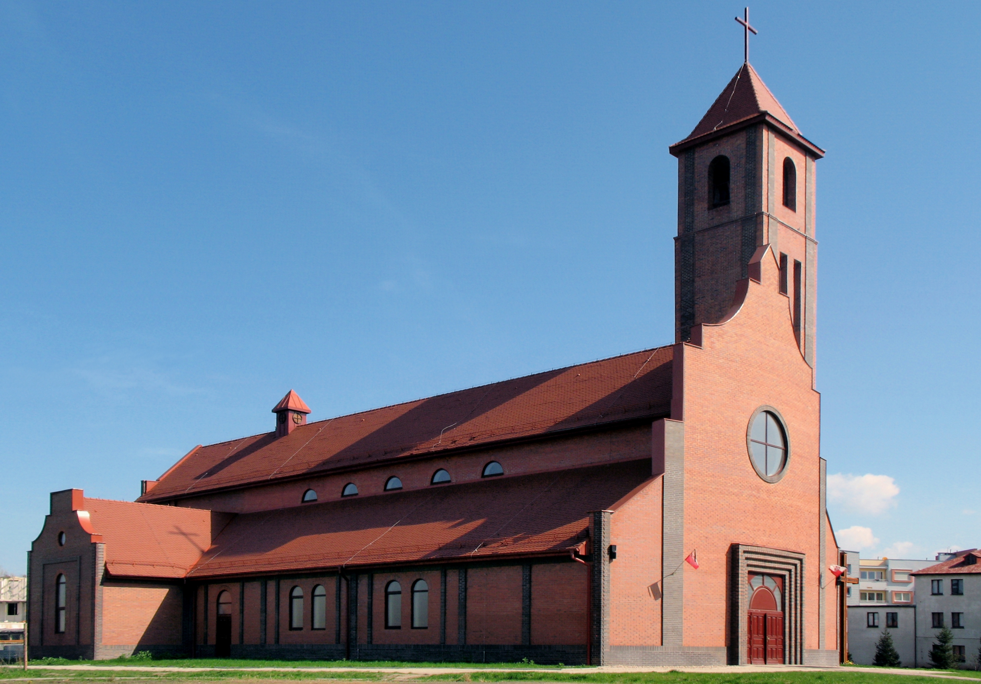 Wrocław, kościół Miłosierdzia Bożego we Wrocławiu, ul. Bajana 47a, Gądów Mały (tzw. "Kosmonautów")